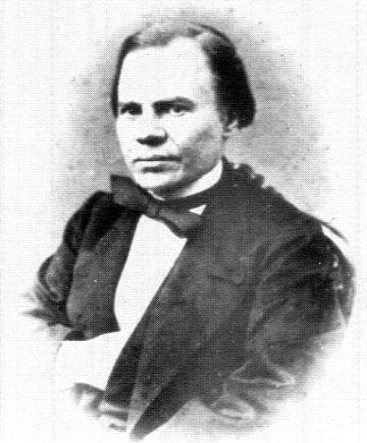 Портрет Василия Белозерского